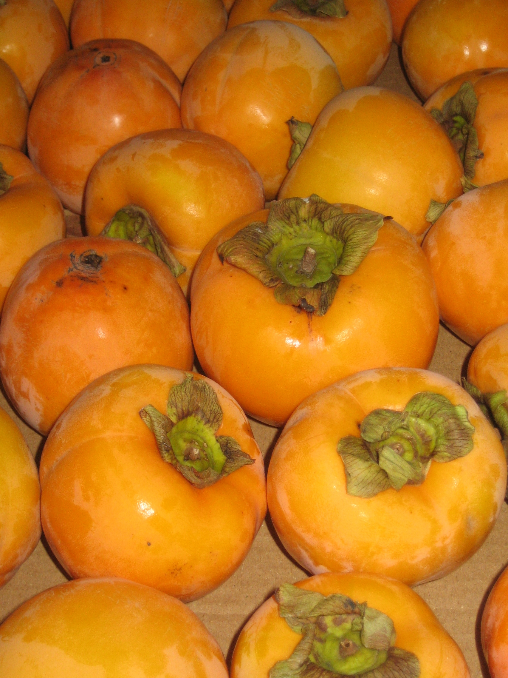 Kaki fruit